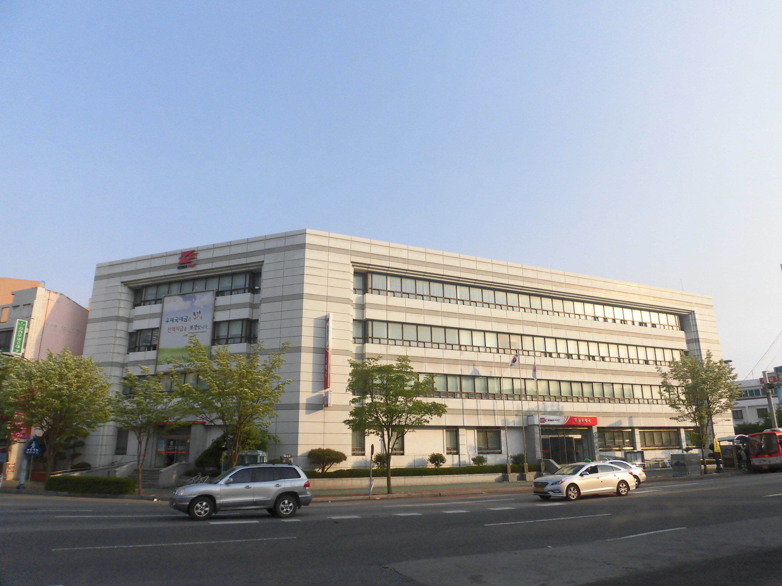 전라남도 목포시에 있는 목포우체국